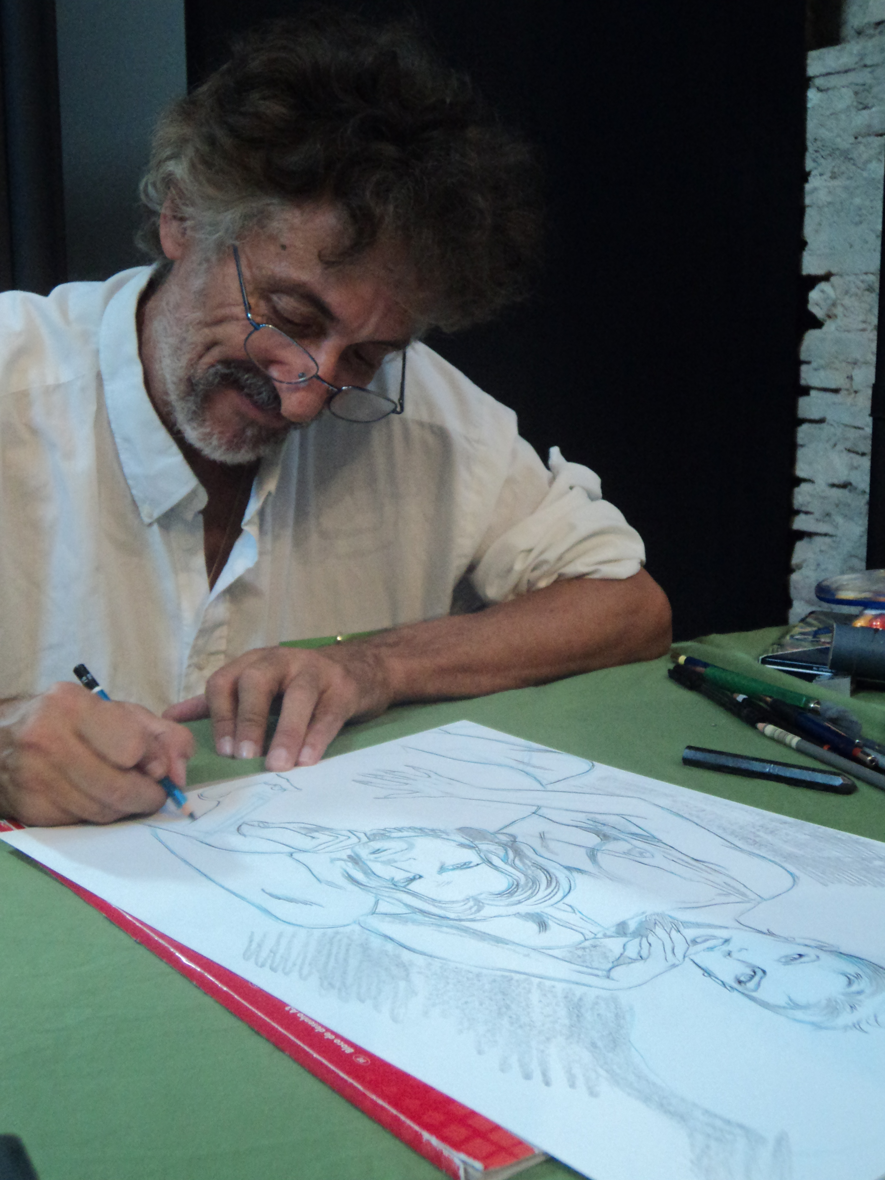 Mauro Laurenti a Narnia Fumetto 2013